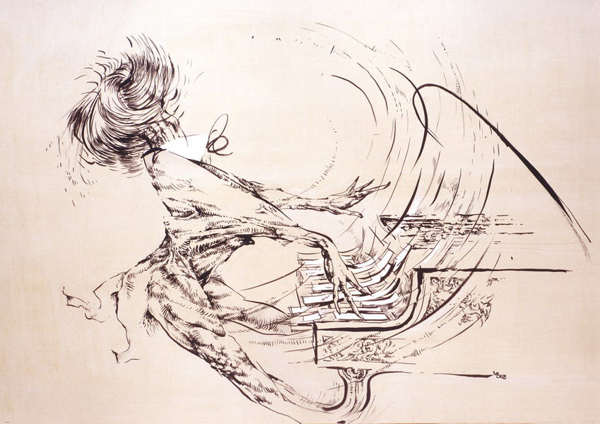 НОКТЮРН (из серии «Музыка»). Бумага тонированная, кисть, перо, тушь, 72×55 см. 1988 г.